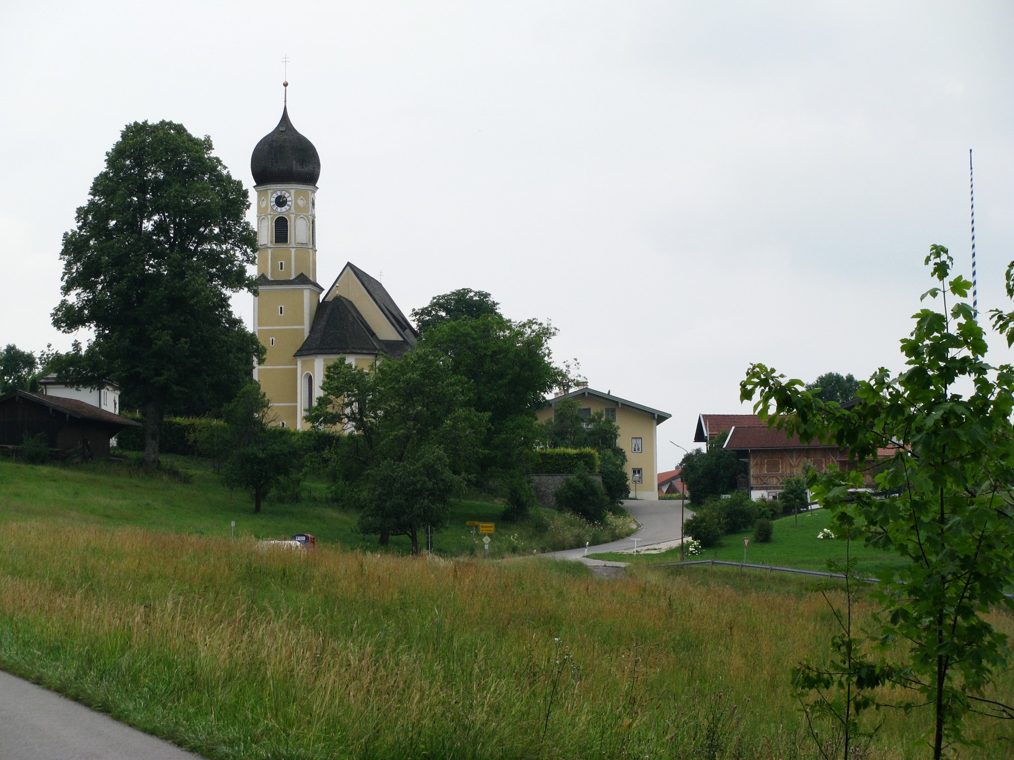 Östliche Ortseinfahrt von Niklasreut; Pfarrkirche St. Nikolaus